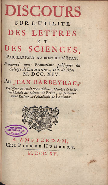 Frontespizio